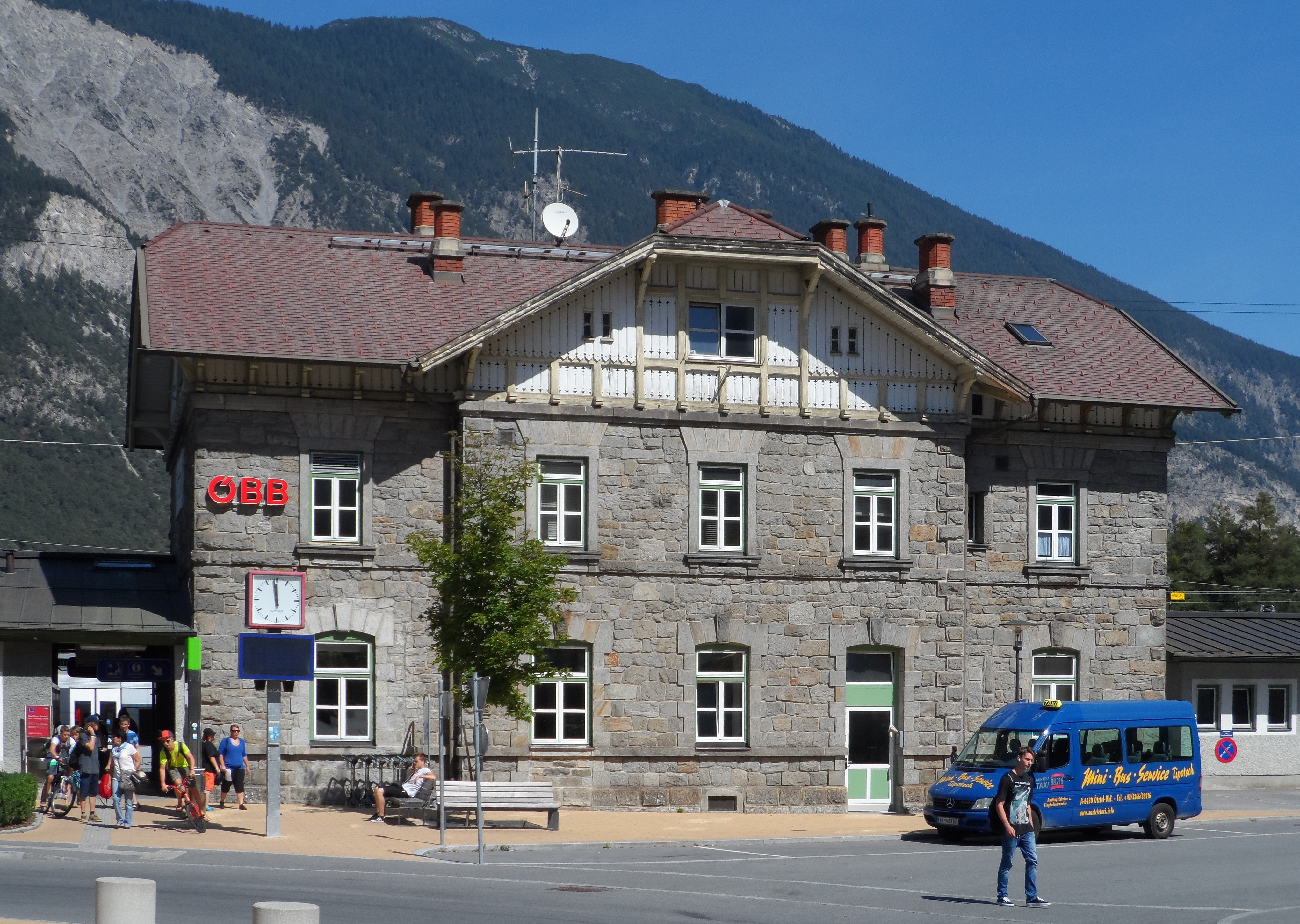 Aufnahmsgebäude Ötztal - Ötztal-Bahnhof, Haiming